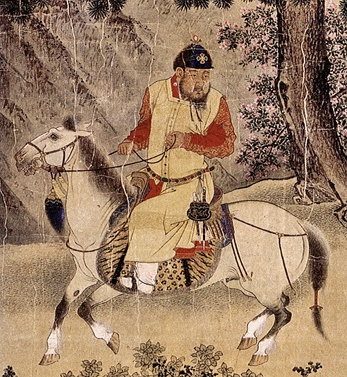 中文（香港）: 宣宗出獵圖軸（局部）